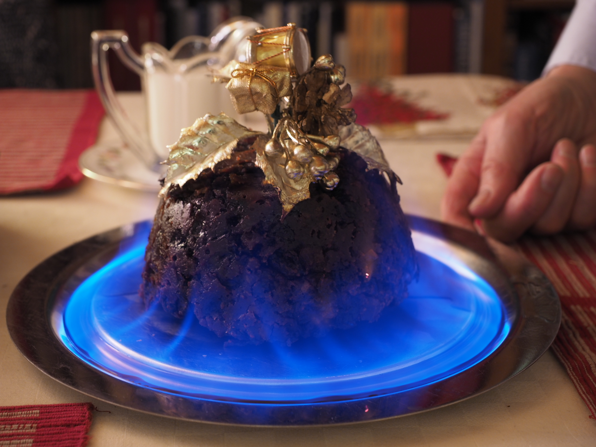 Pudding inferno